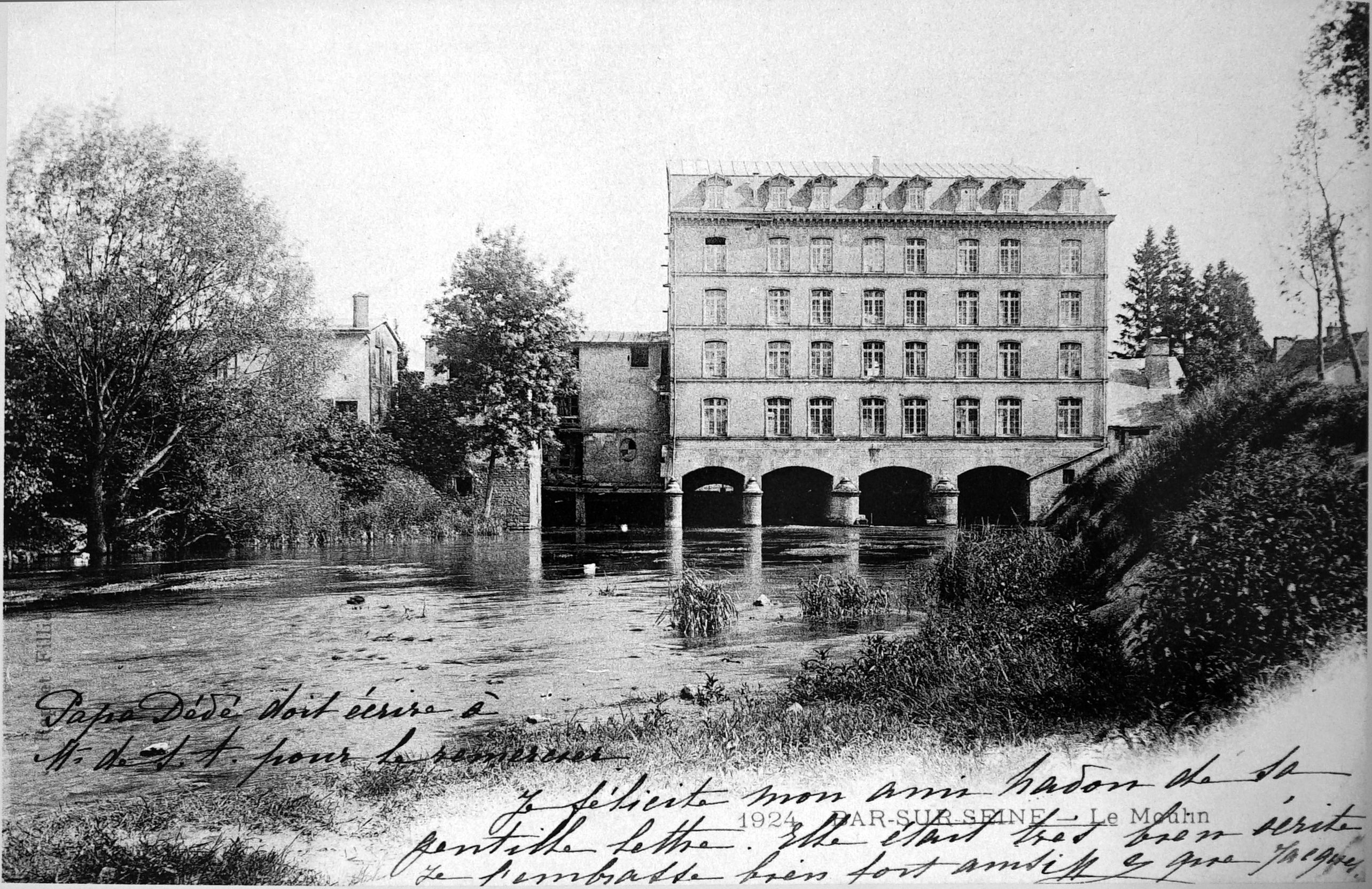 sur une vue ancienne.